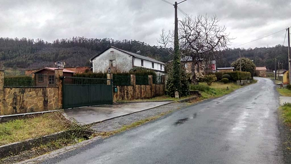 Vista da Pedra, Pedroso, Narón.